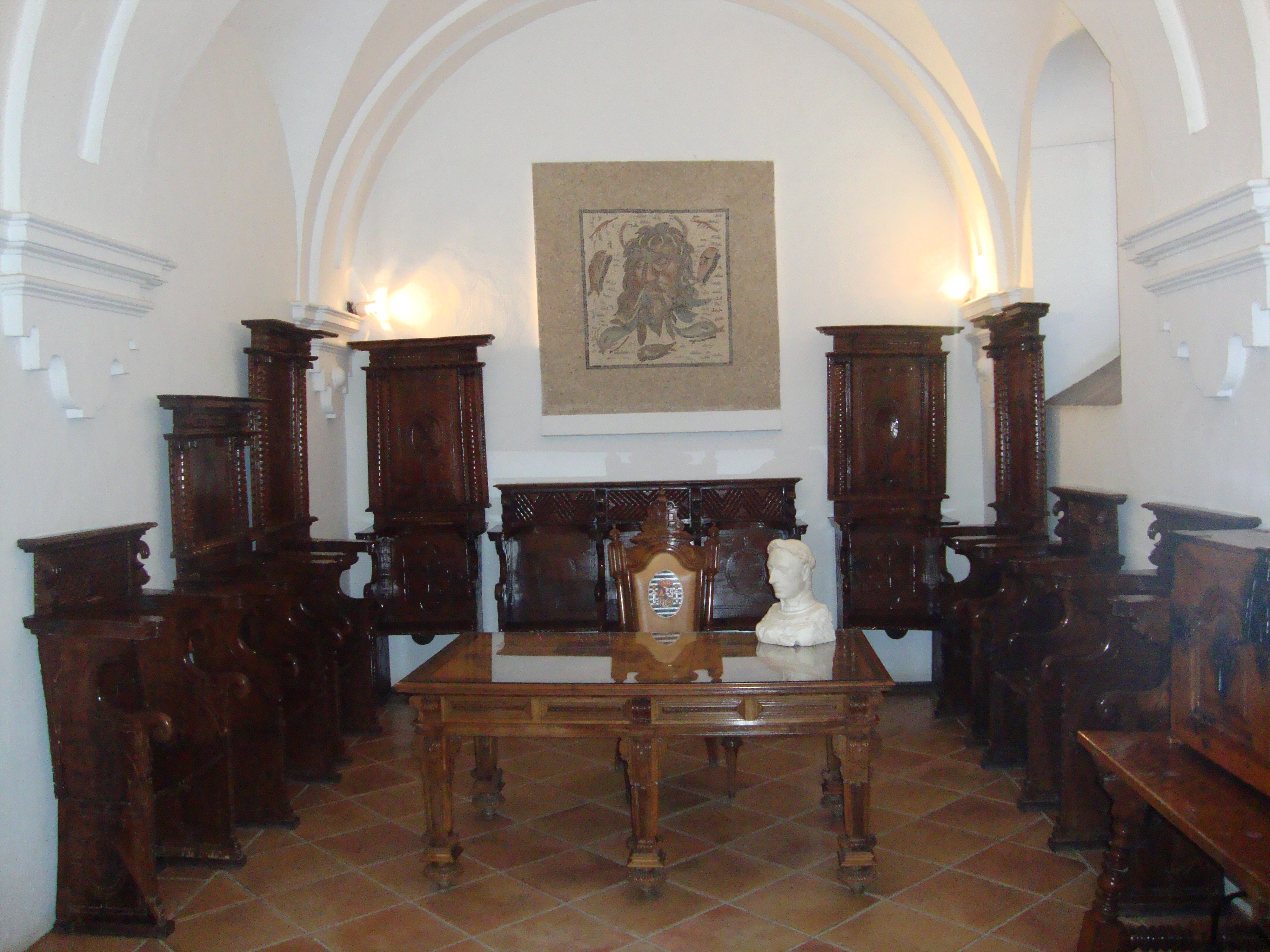 Una de las salas del Alcázar de Córdoba. .